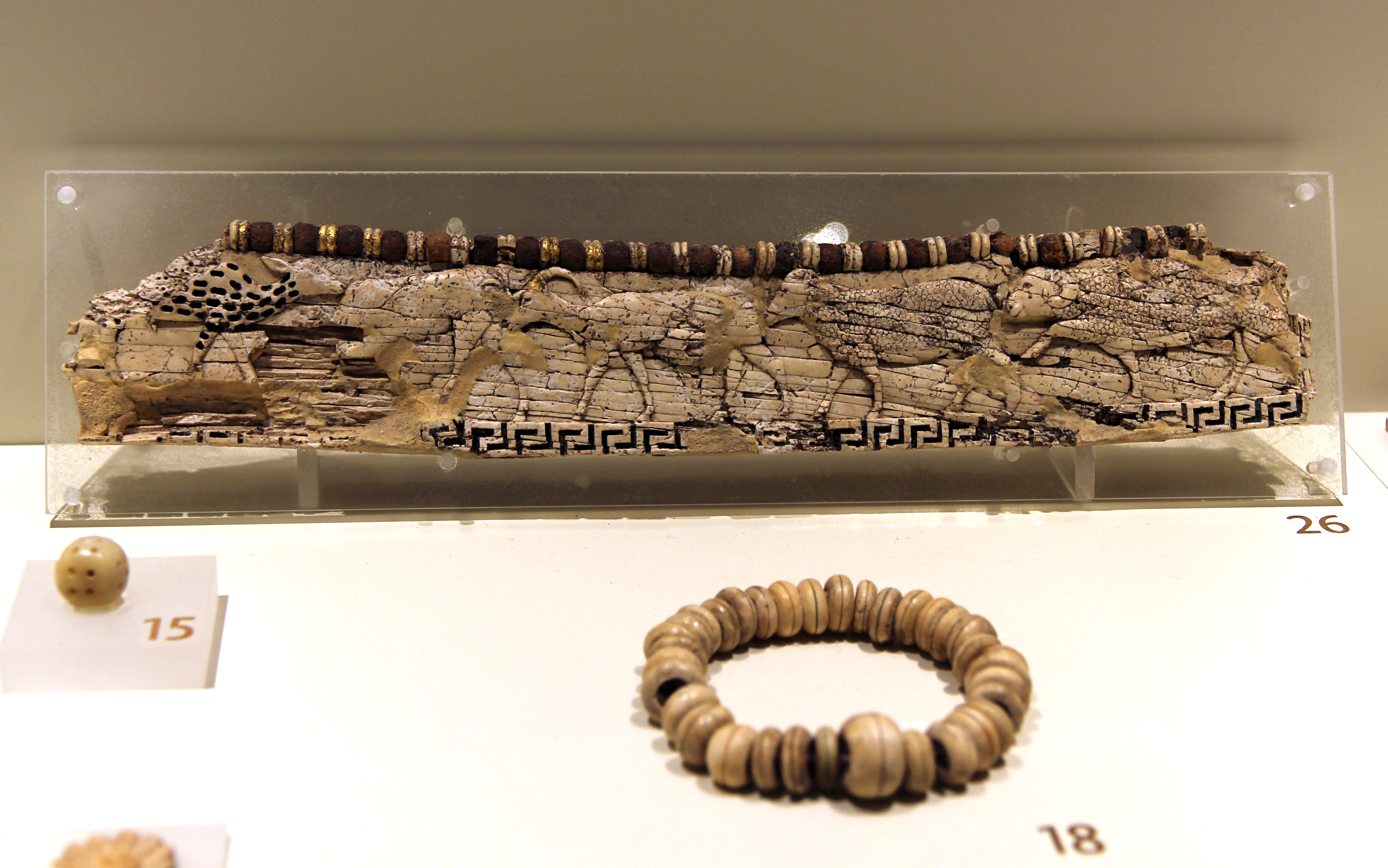 Museum für anatolische Zivilisationen, Ankara, Türkei, Elfenbeinobjekt aus Kerkenes